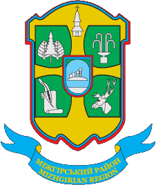 Герб Міжгірського району